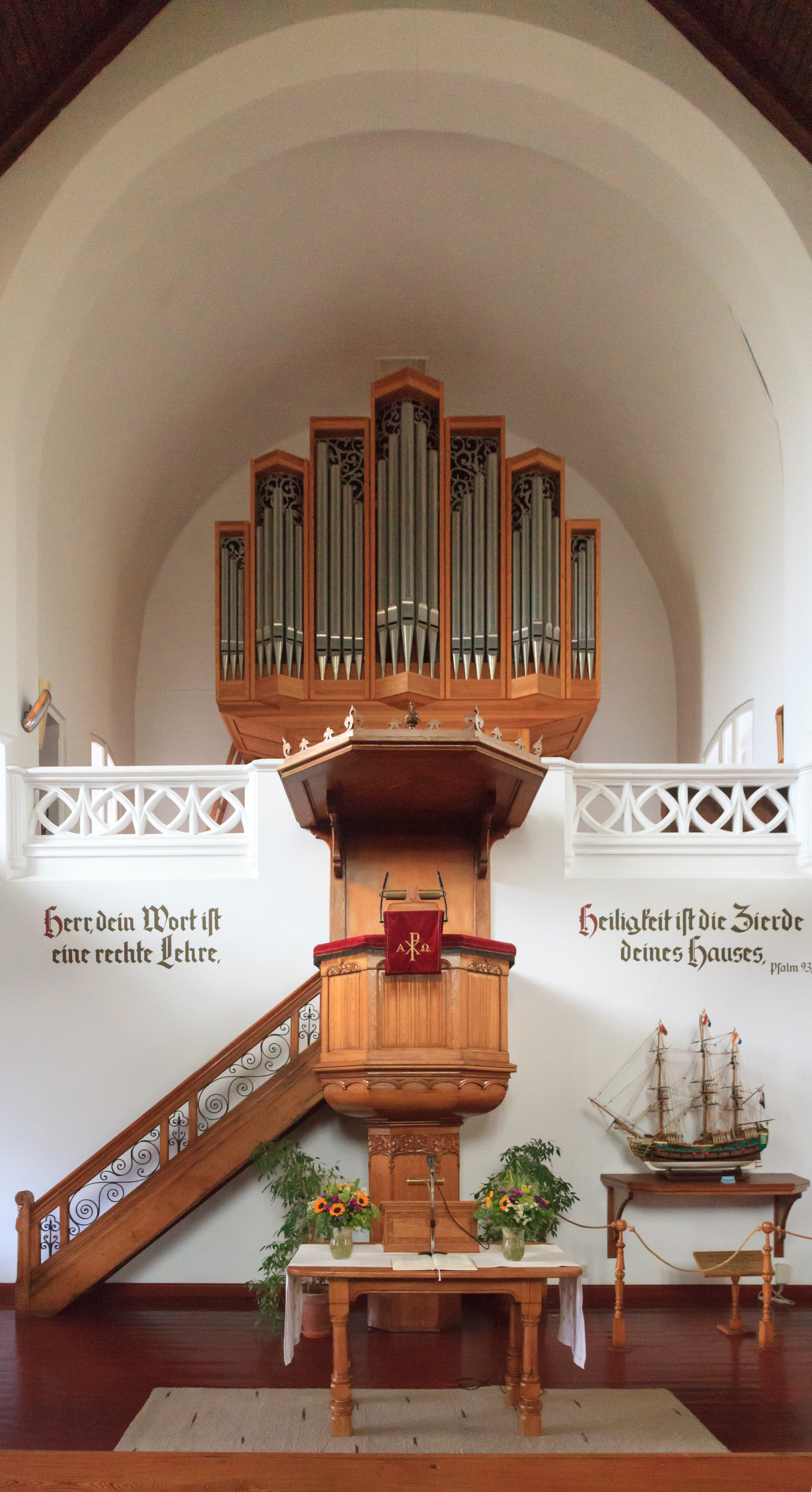 Borkum Reformierte Kirche Altar und Orgel